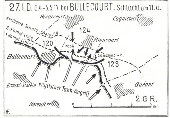 Milgesch